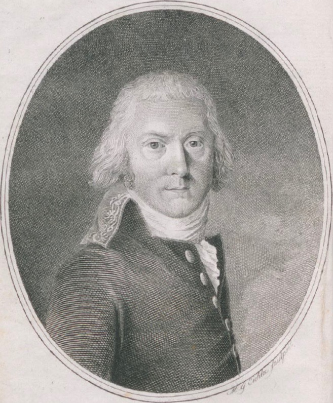 Matthias Gottfried Eichler (1748–1821): Alois von Reding (1765–1818). Frontispiz in Heinrich Zschokke: "Geschichte vom Kampf und Untergang der schweizerischen Berg- und Waldkantone, besonders des alten eidsgenössischen Kantons Schwyz," Bern/Zürich 1801.